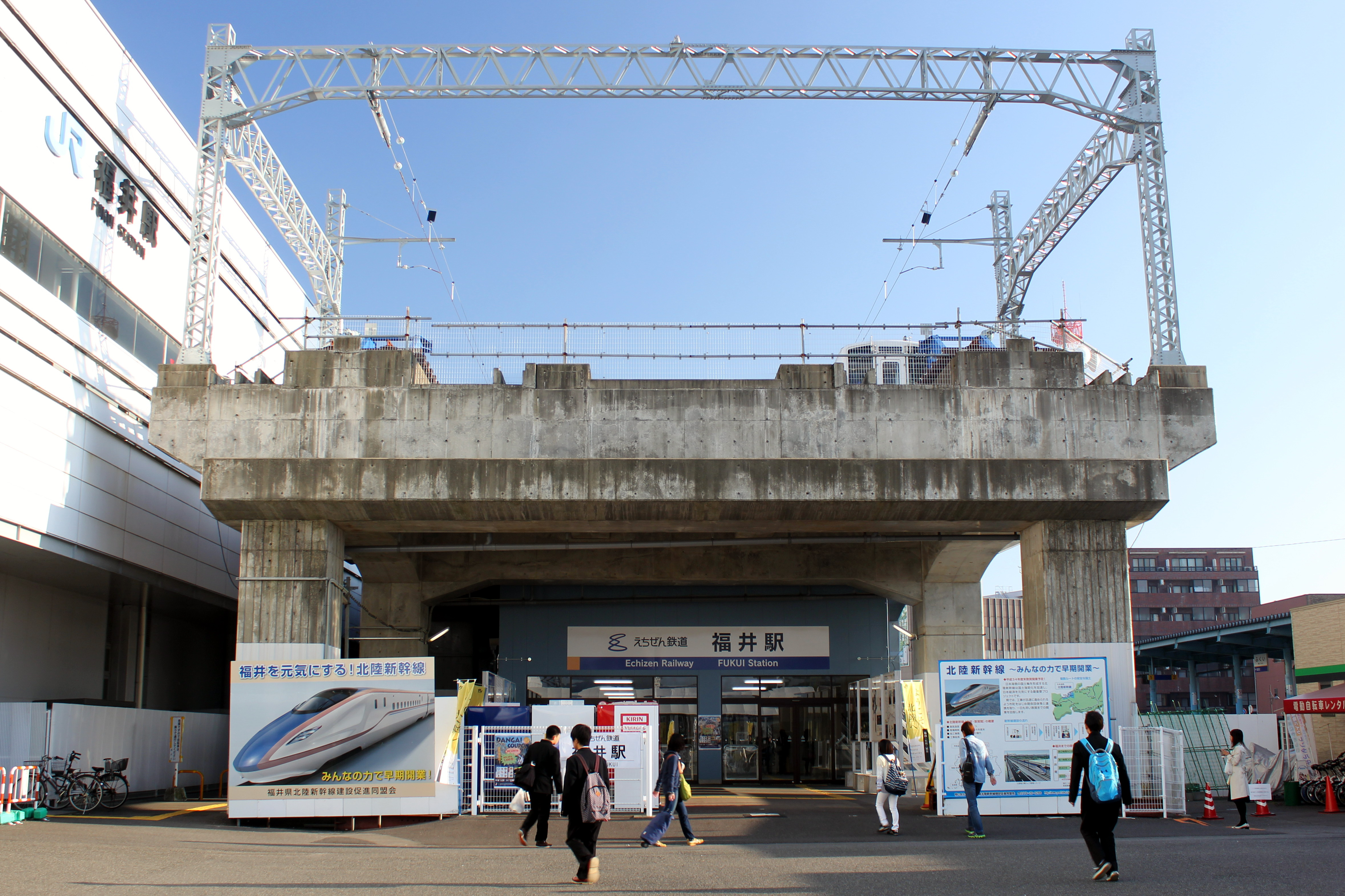 えちぜん鉄道 福井駅 新幹線高架利用後